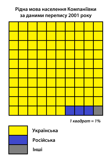 Інфографіка розподілу населення смт Компаніївка за рідною мовою згідно з даними перепису 2001 року. Джерело: Розподіл населення Кіровоградської області за рідною мовою (у % до загальної чисельності населення) за переписом 2001 року